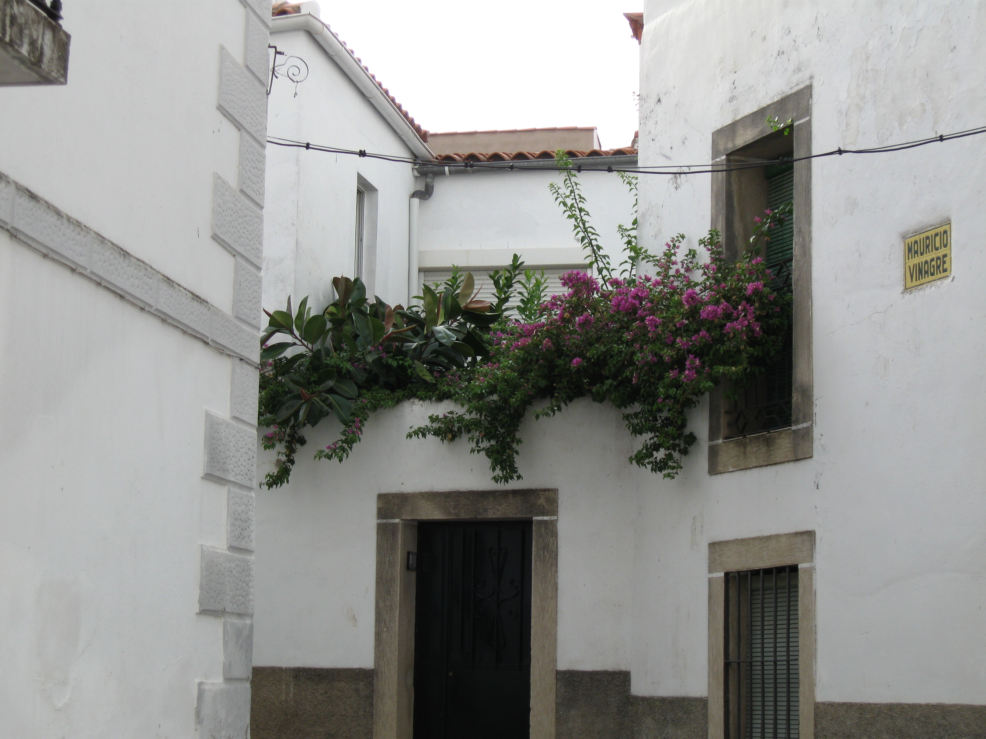 Rincón con flores en Brozas, provincia de Cáceres, España.